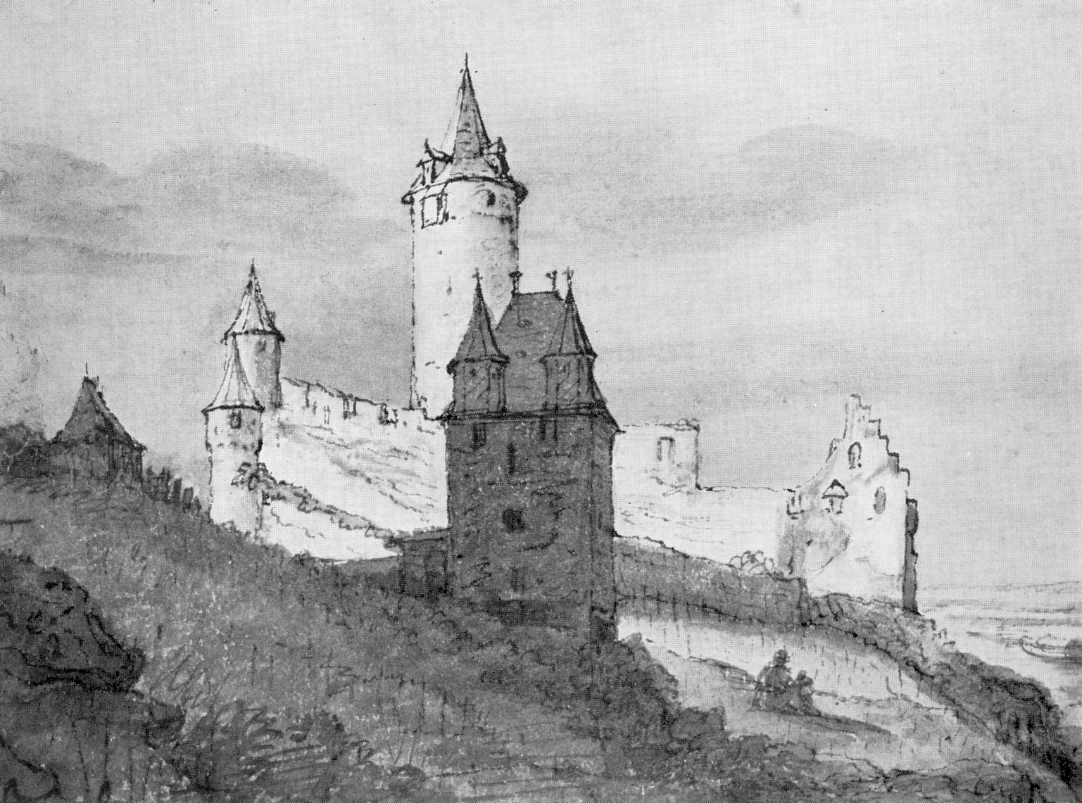 Die Burg Stahleck 1663, Zeichnung im Museum voor oude Kunst